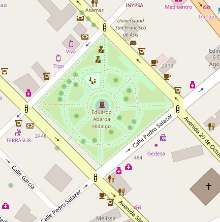 Mapa de la plaza Abaroa